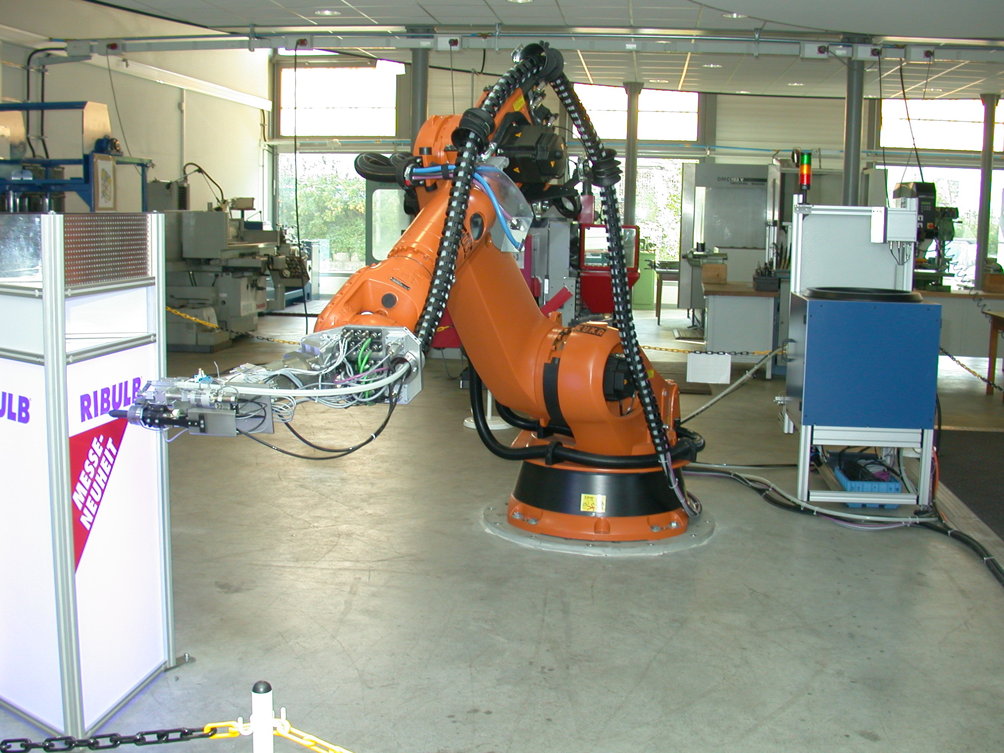 Blindniet-Roboter-Setzanlage